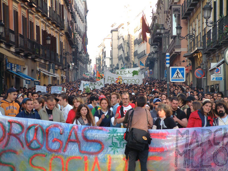 Cabeza de manifestación en Mayo del 2004.